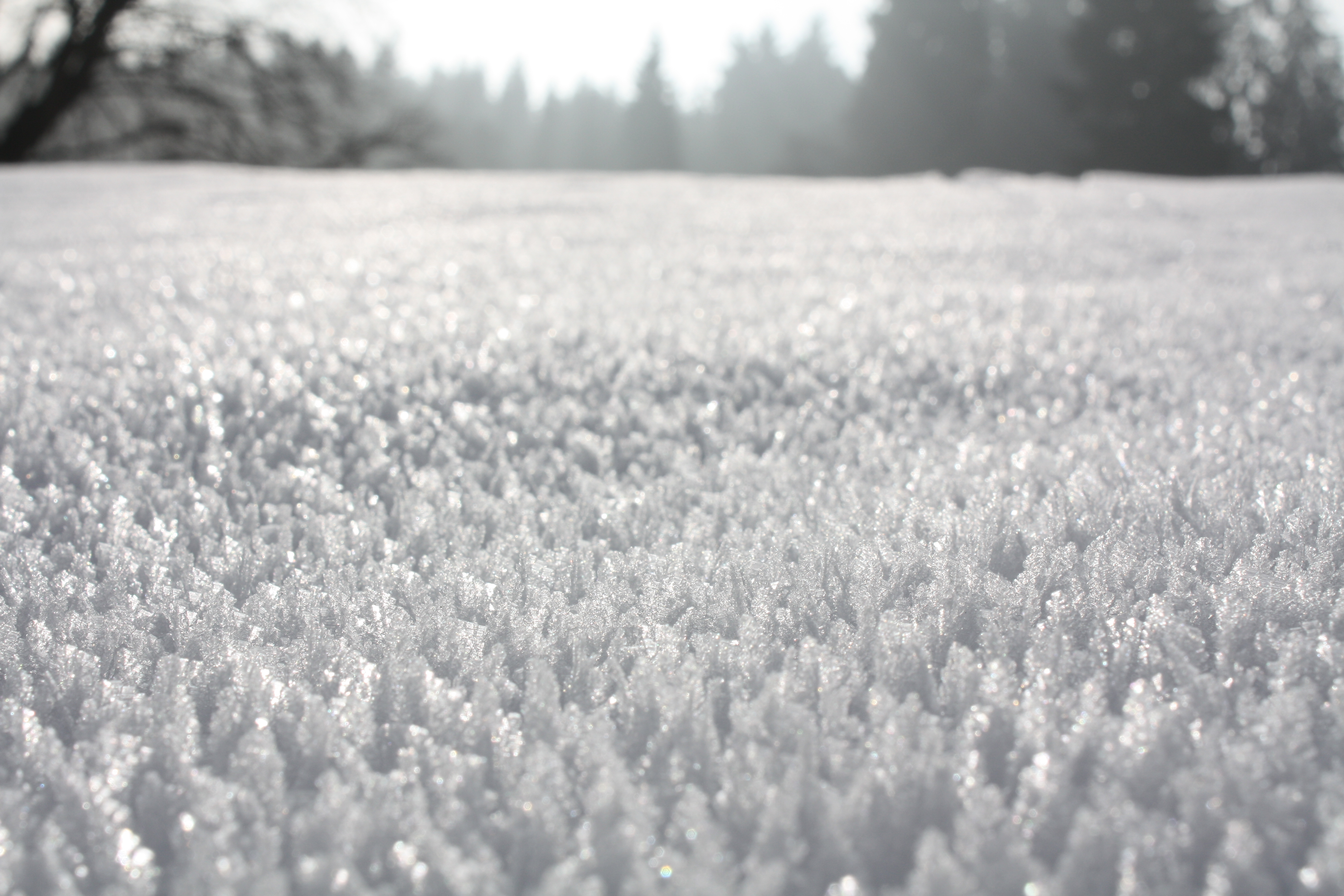 Bizarre Schneekristalllandschaft Kladská, Tschechien